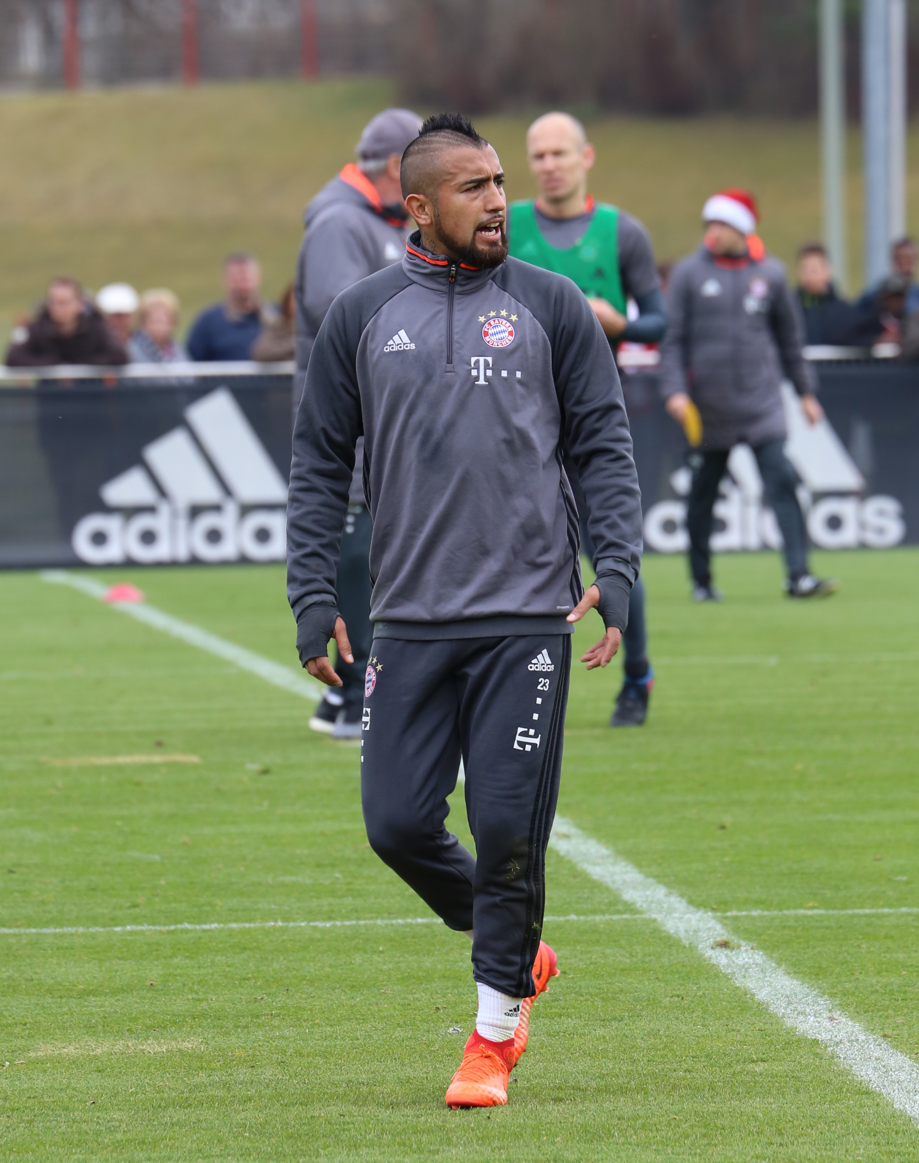 Arturo Vidal, am 14. März 2017 beim Training auf dem Gelände des FC Bayern München